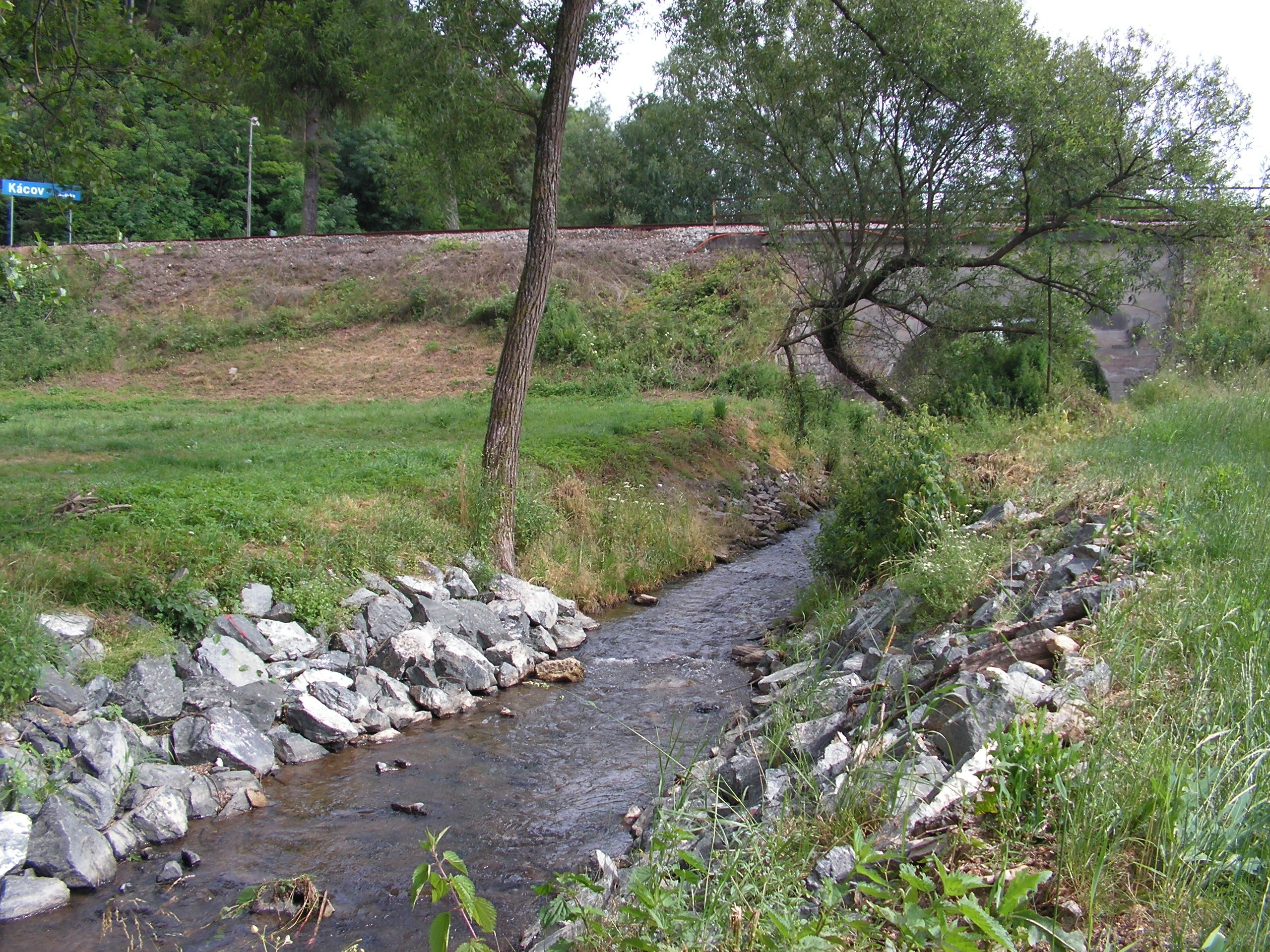 Čestínský potok v Kácově před ústím do Sázavy